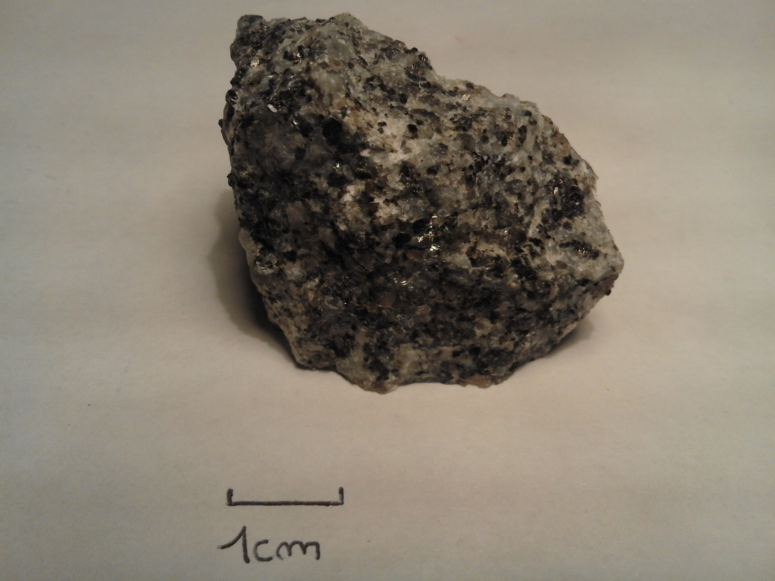 Granodiorirte sample (Normandy, France)